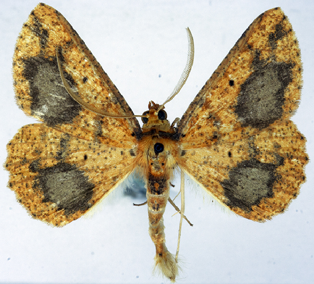 Synegia fulvata tephrospila